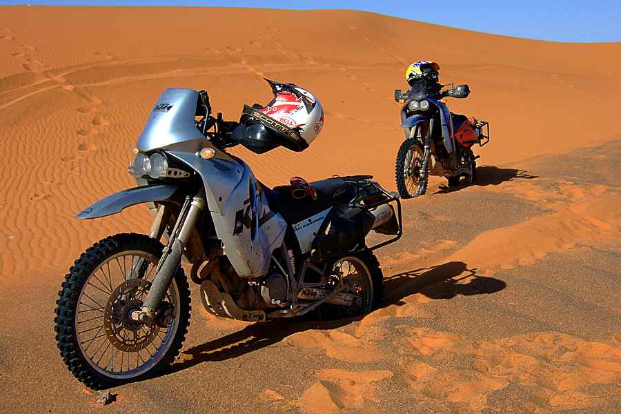 KTM 640 LC4 Adventure (2003 model l., 1998 model r.) in the desert